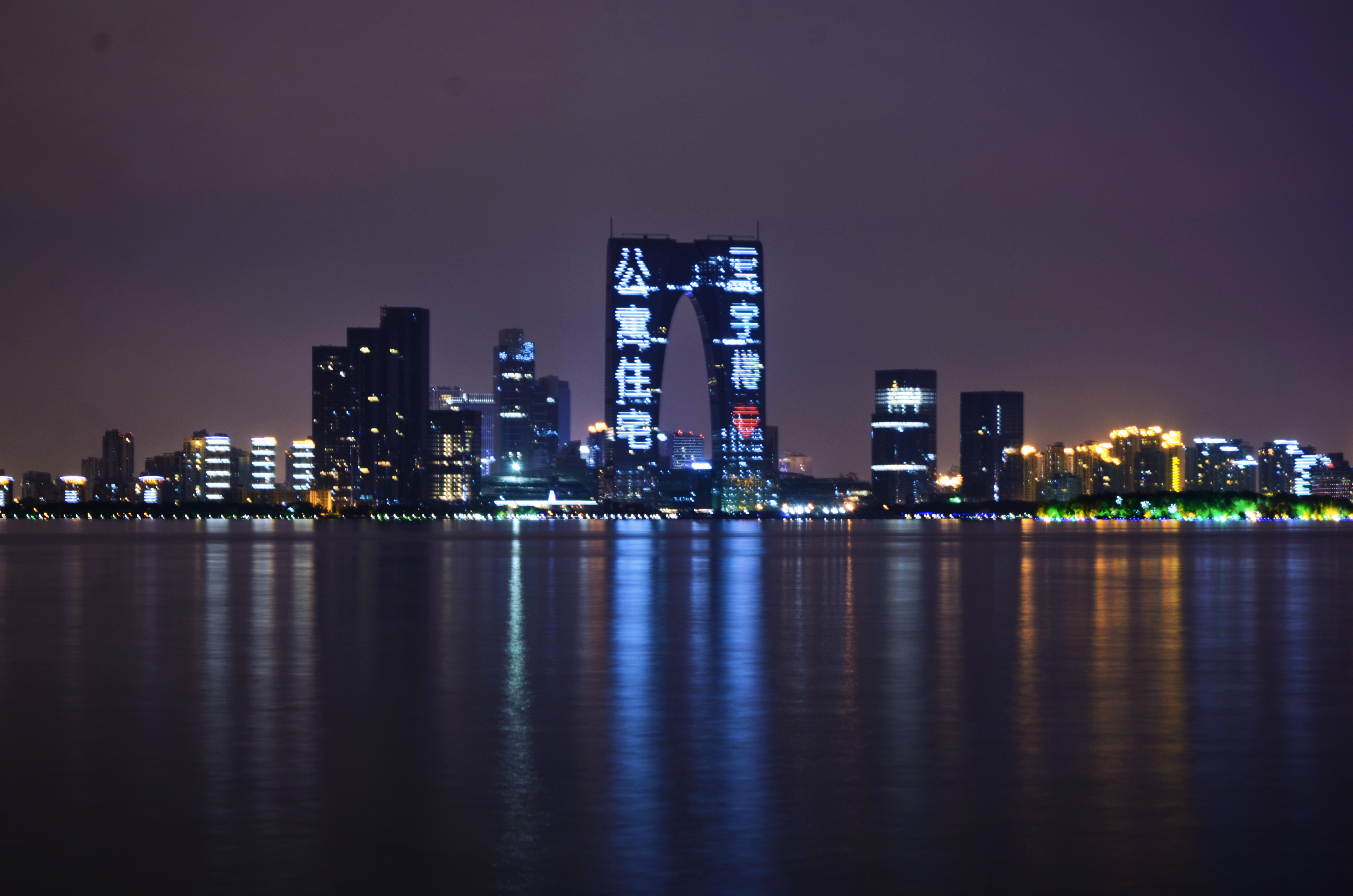 2016年11月12日的东方之门夜景